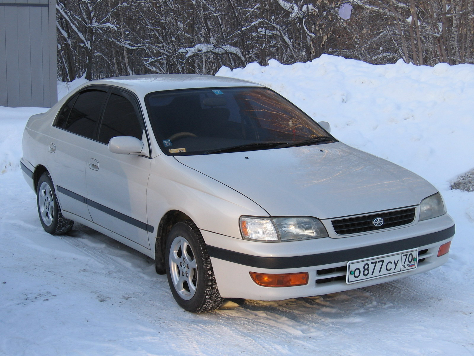 Photo taken in Tomsk, Russia.